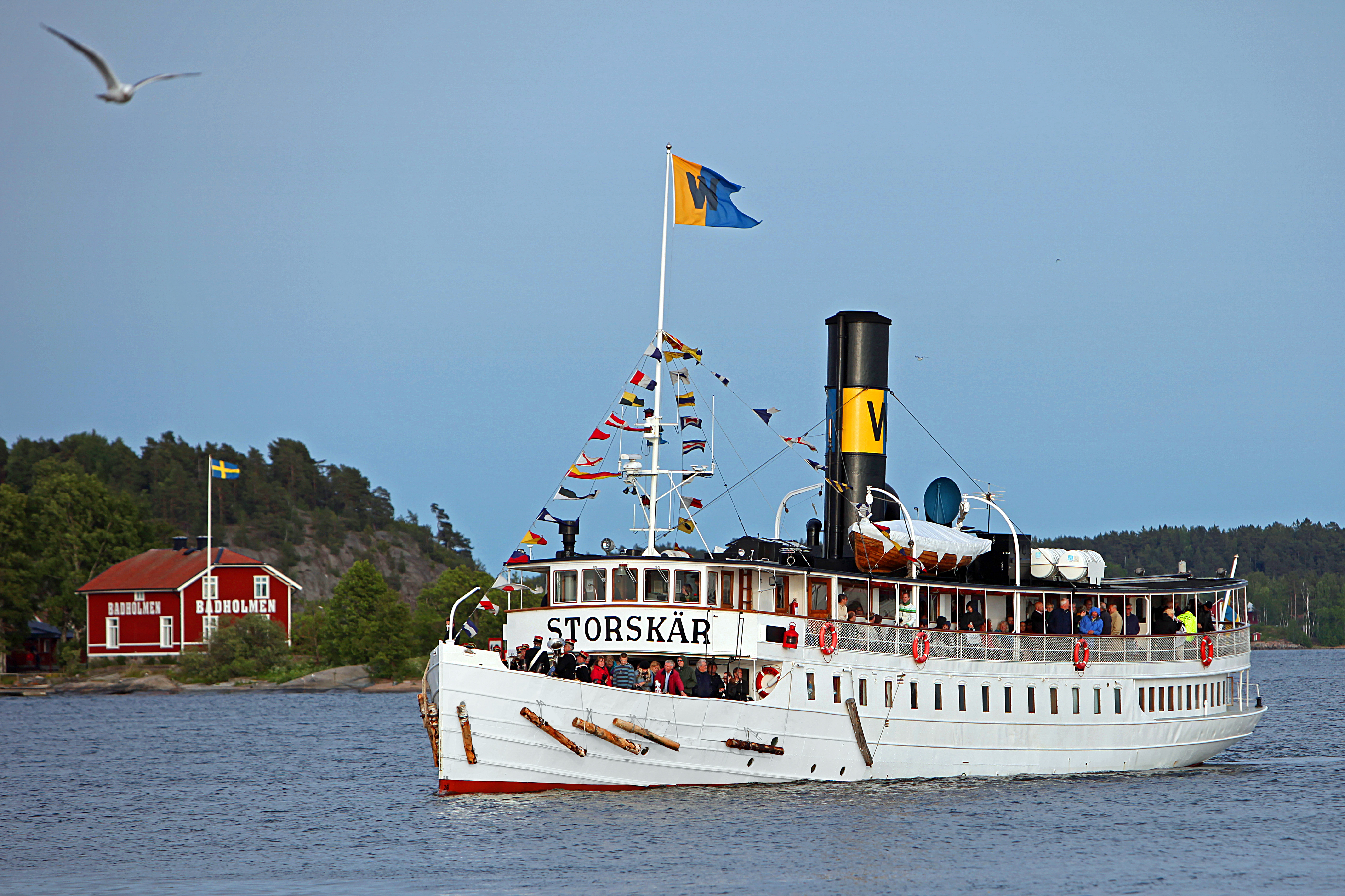 Storskär